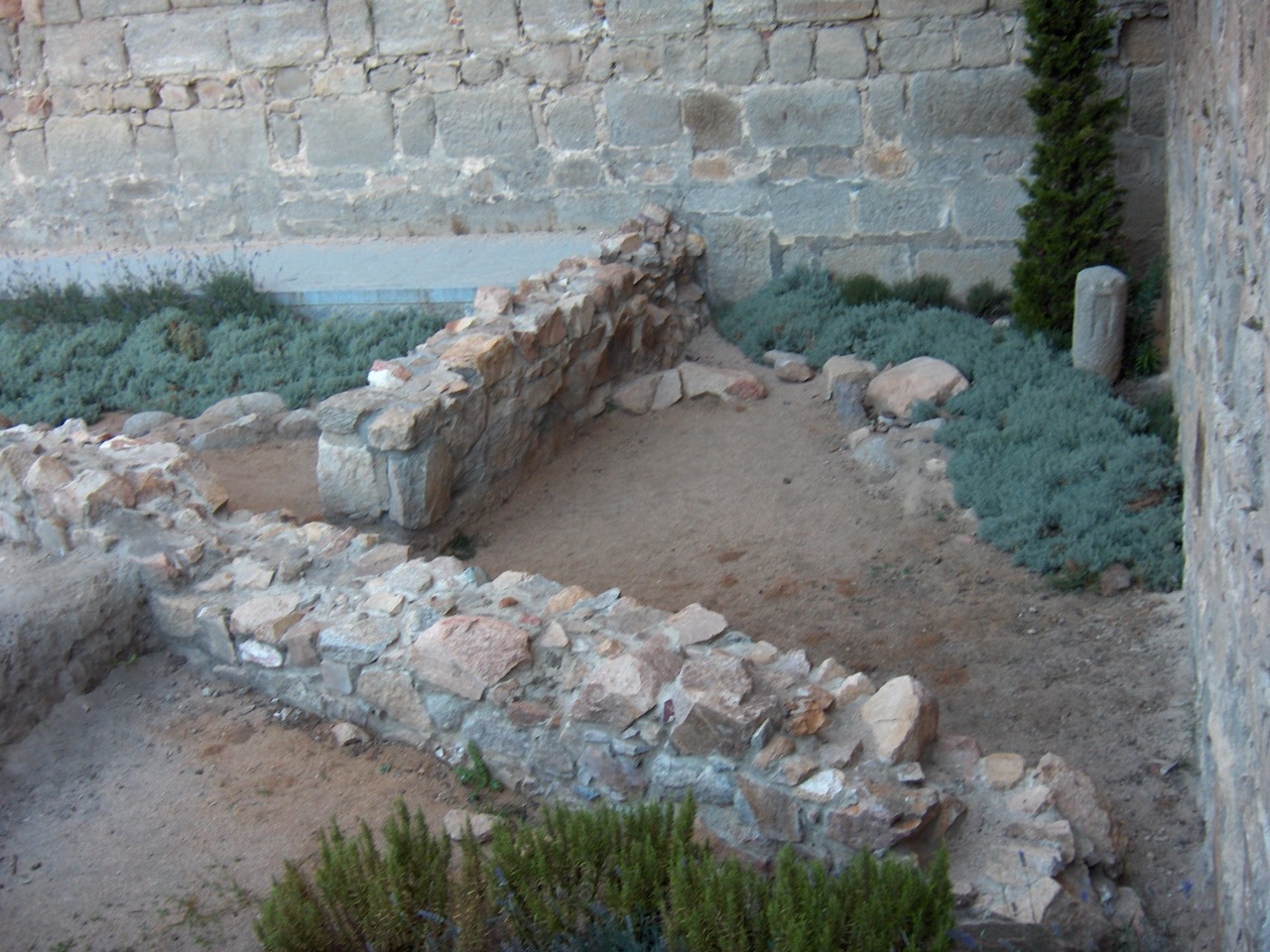 Restos romanos cerca de la Puerta de San Vicente (Ávila, España).